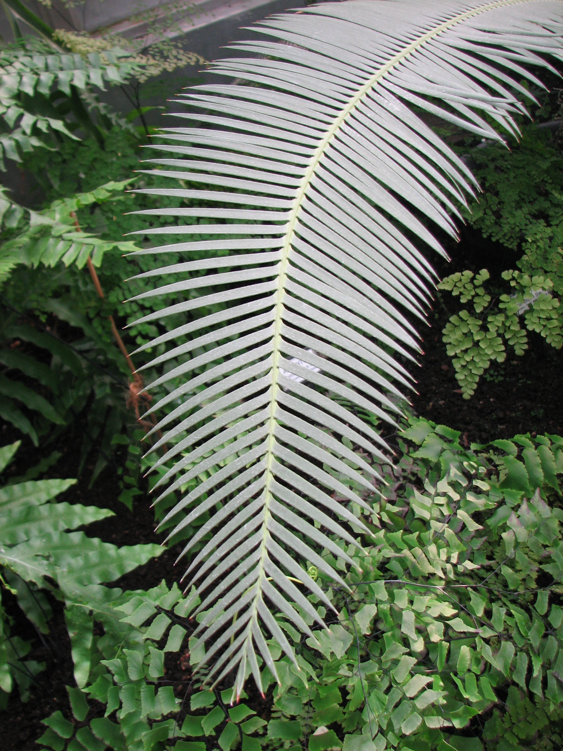 Dioon edule Lindl. - list (Botanická zahrada PřF MU)